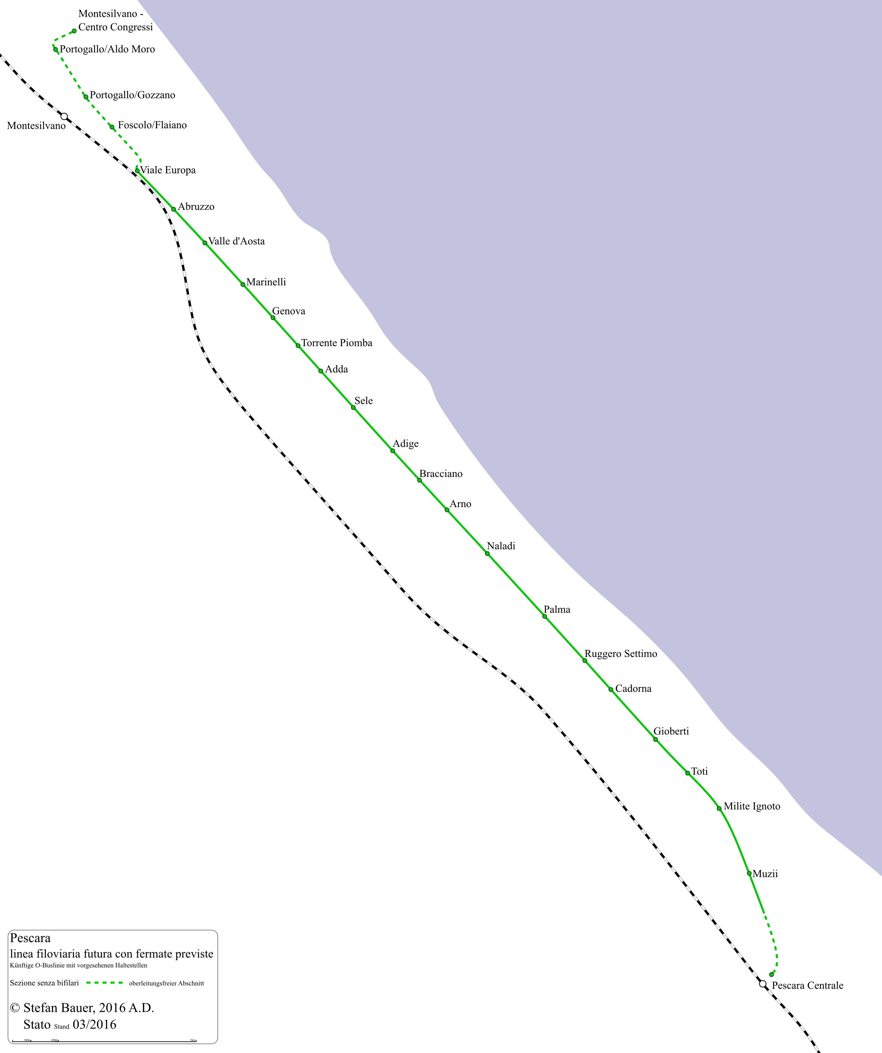 Mappa della futura linea filoviaria di Pescara (stato 2016)